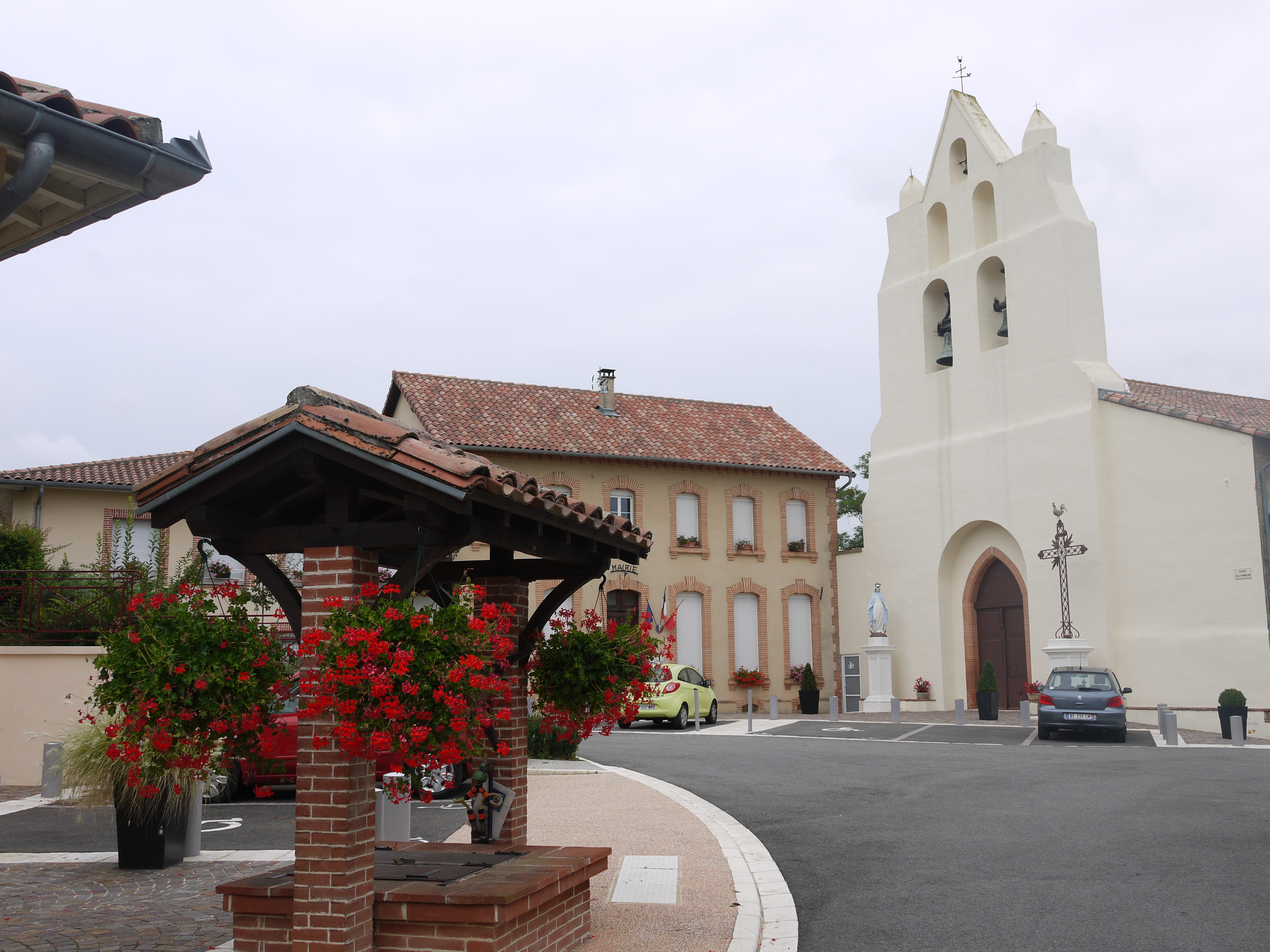 La place Elie Rançon de Sauveterre, avec l'église et la mairie.